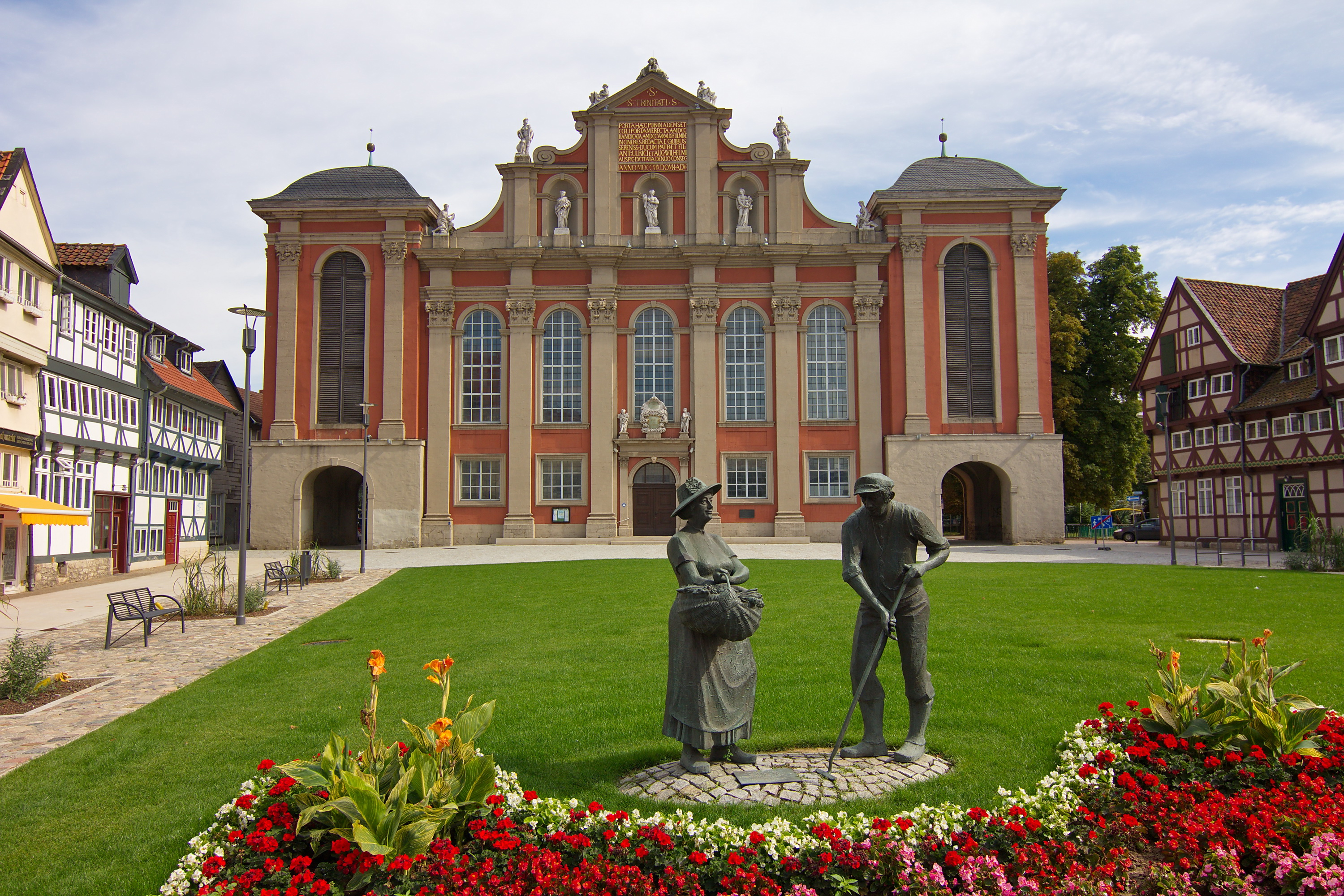 Die 1719 geweihte heutige St.-Trinitatiskirche wurde am Standort der Vorgängerkirche errichtet. Ursprünglich befand sich hier das 1578 fertiggestellte Kaisertor.